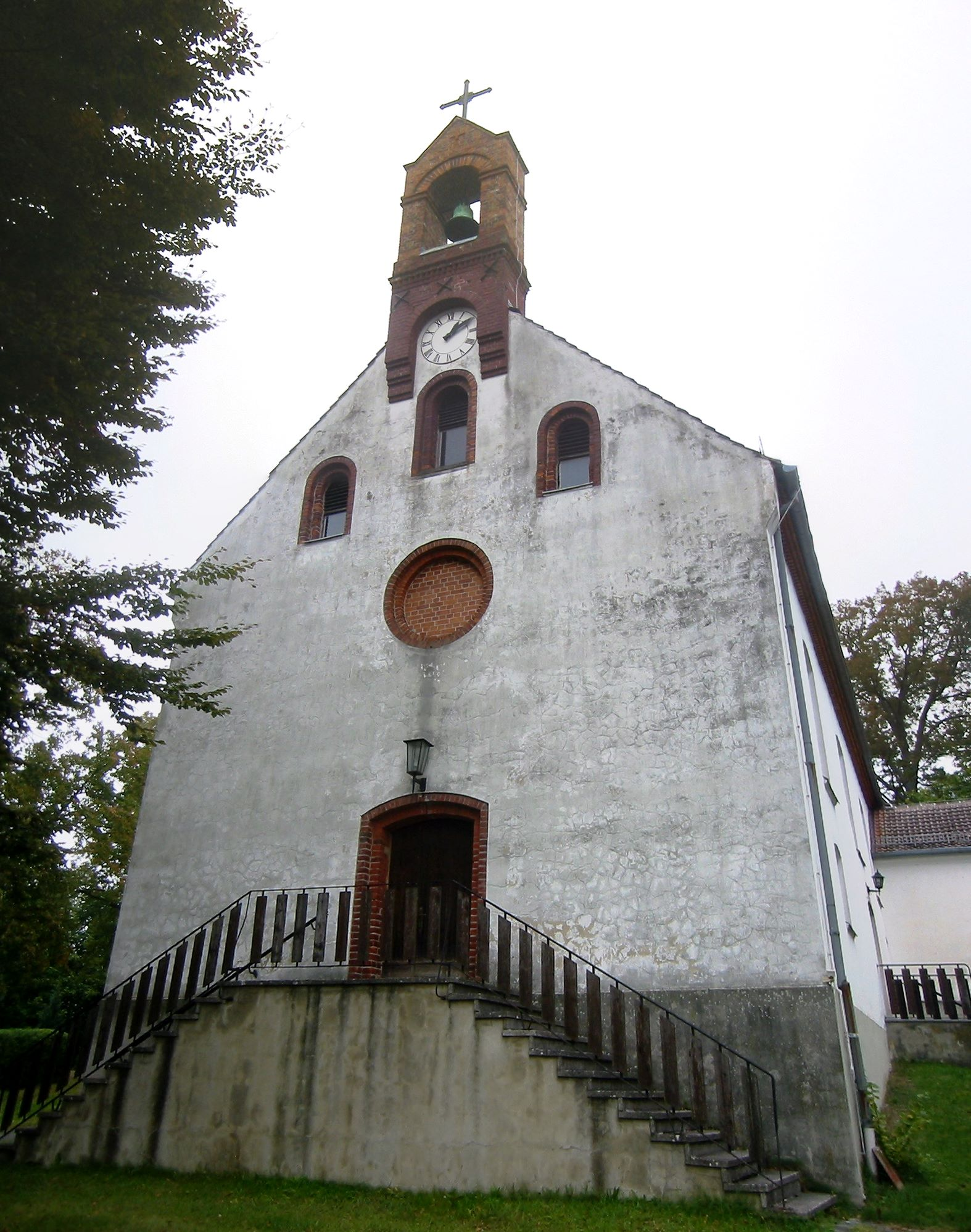 Westseite der Kirche in Münchehofe der gleichnamigen Gemeinde im Landkreis Dahme-Spreewald in Brandenburg